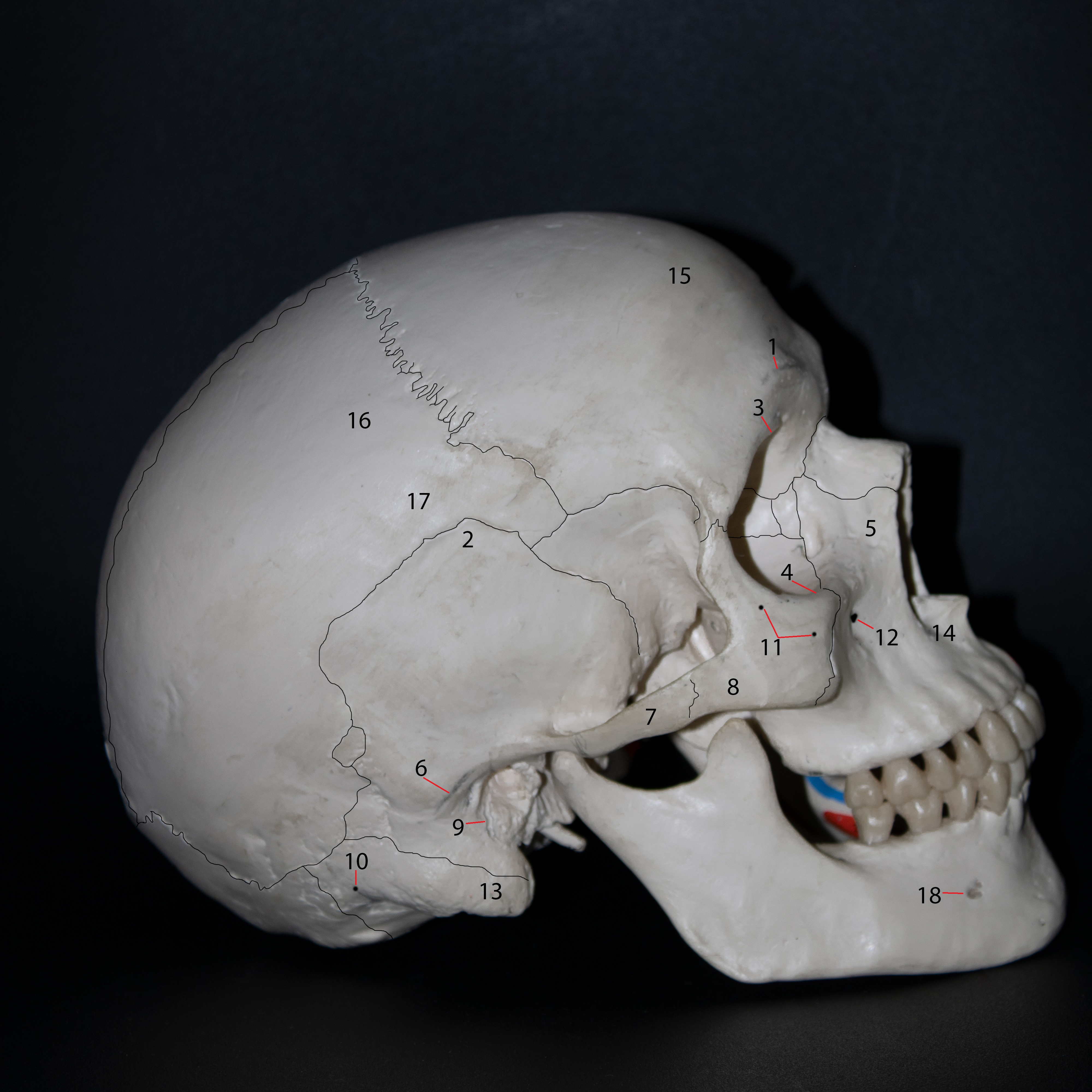 Πλάγια άποψη κρανίου με τονισμένες περιοχές ενδιαφέροντος και αρίθμηση